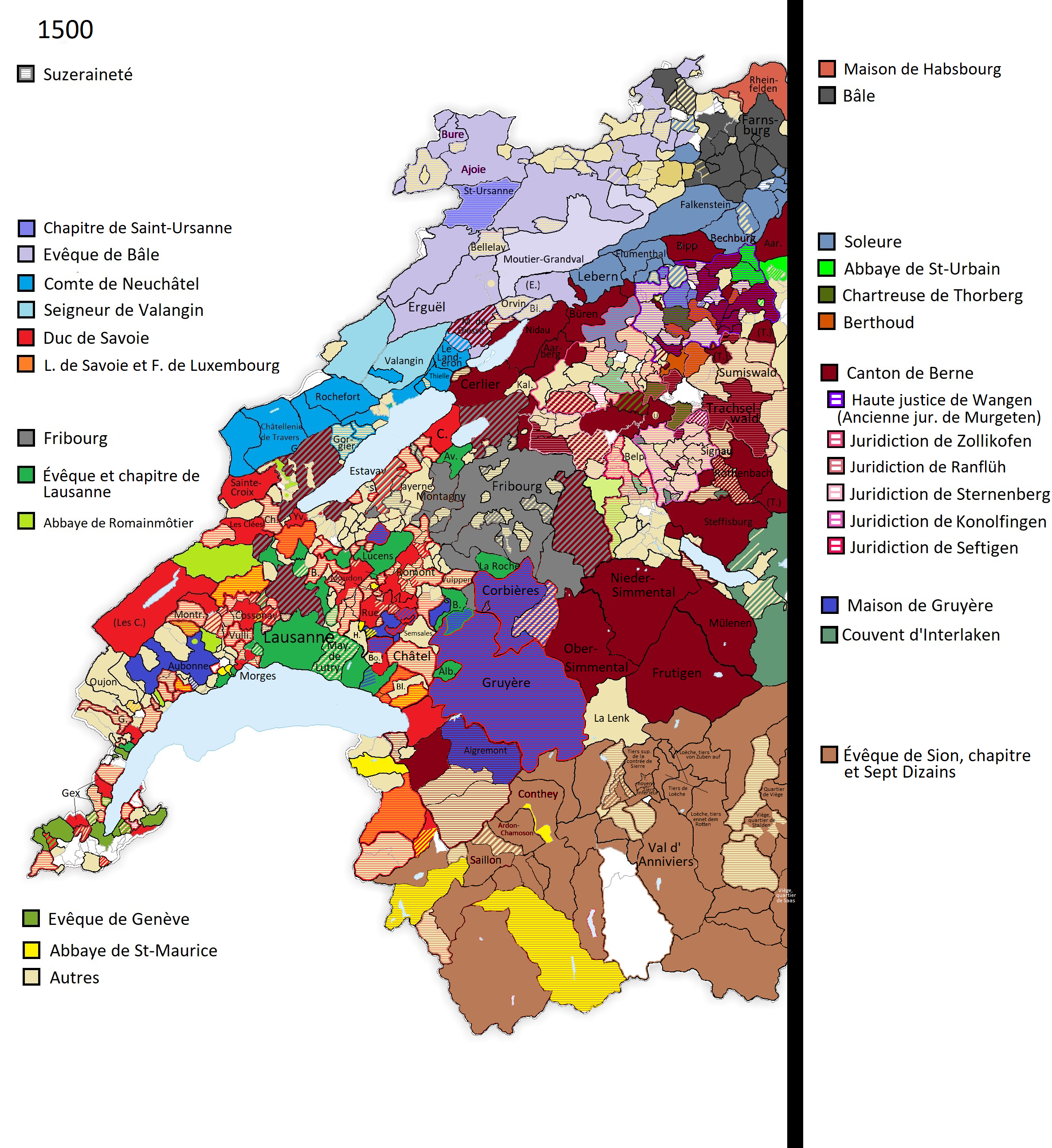 This file was derived from: Karte Gemeinden der Schweiz 1986.01.01.png La carte montre les possessions de la maison de Savoie (Rouge), l'évêque de Lausanne (vert foncé), l'abbaye de Romainmôtier (vert clair), la maison de Gruyère (Bleu), Berne (Bordeaux), Fribourg (gris) etc.